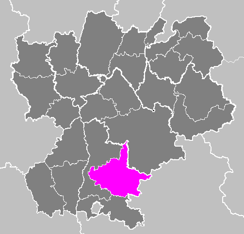 Maps of arrondissements and cantons of France: Arrondissement de Die.PNG (Région Rhône-Alpes)